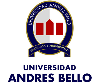 Logo Universidad Andrés Bello